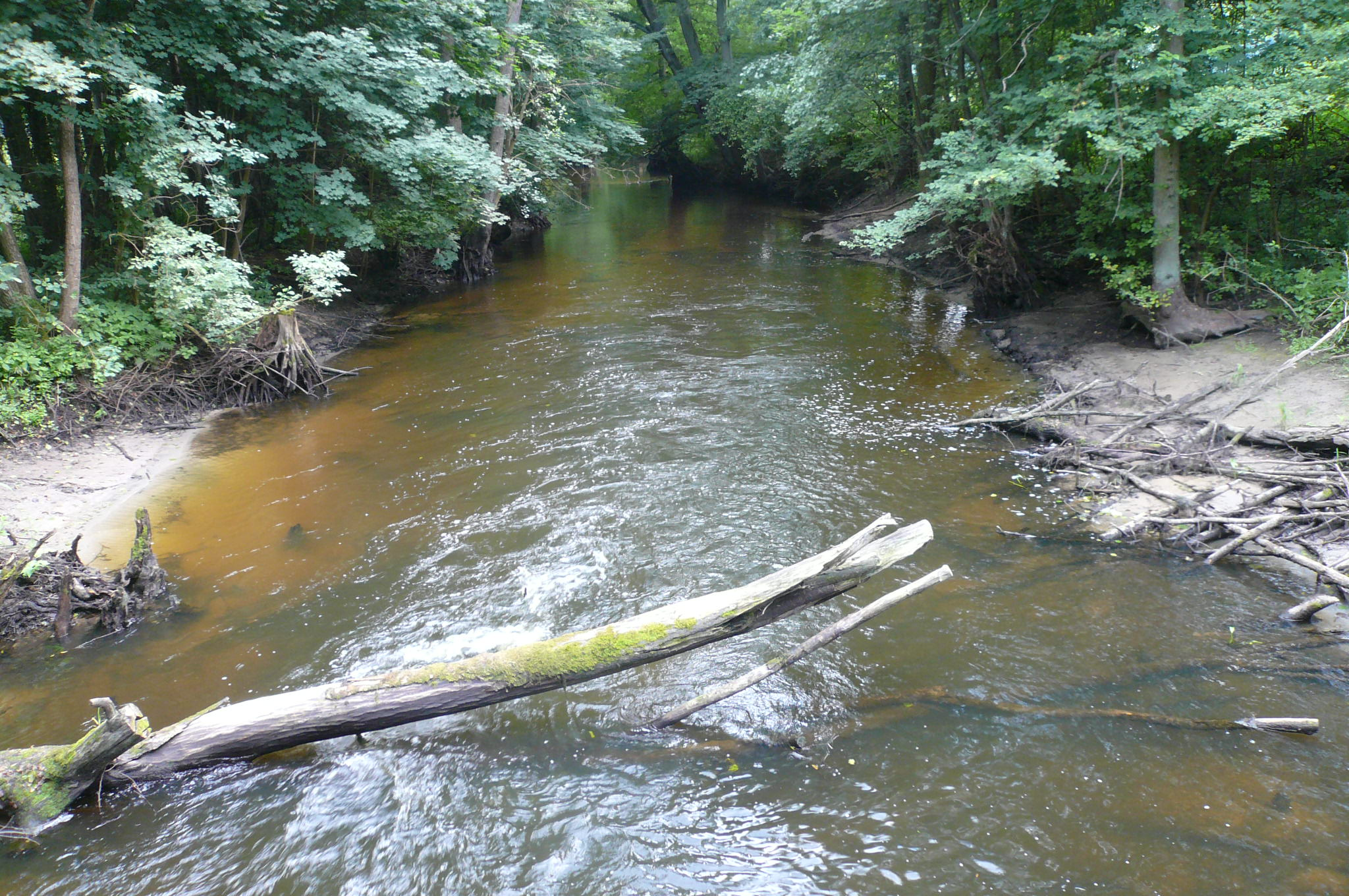 Rzeka Myśla (dopływ Odry) między Więcławiem a Barnówkiem